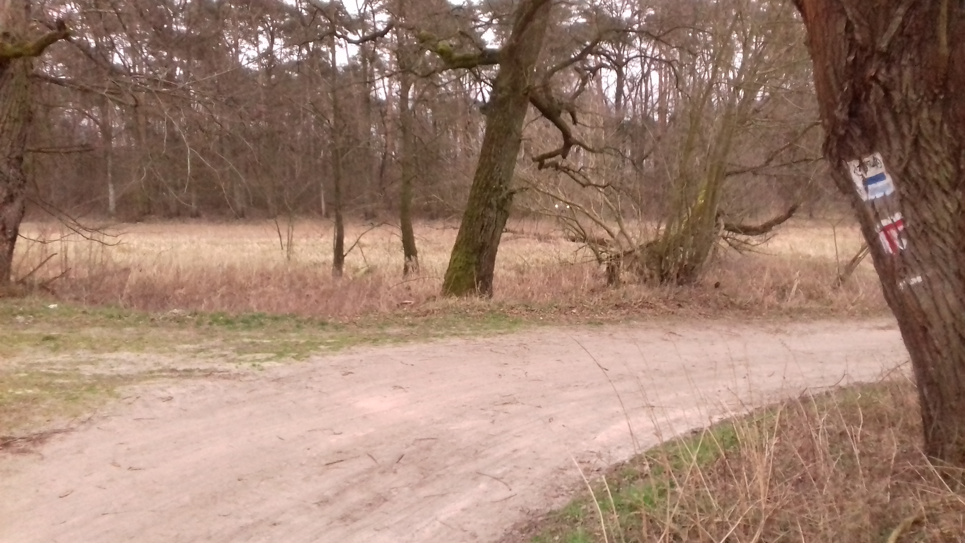 Oznaczenie szlaku pieszego nr 3578 (czerwonego) i Rowerowego Szlaku Konwaliowego koło starorzecza w Rezerwacie Krajkowo